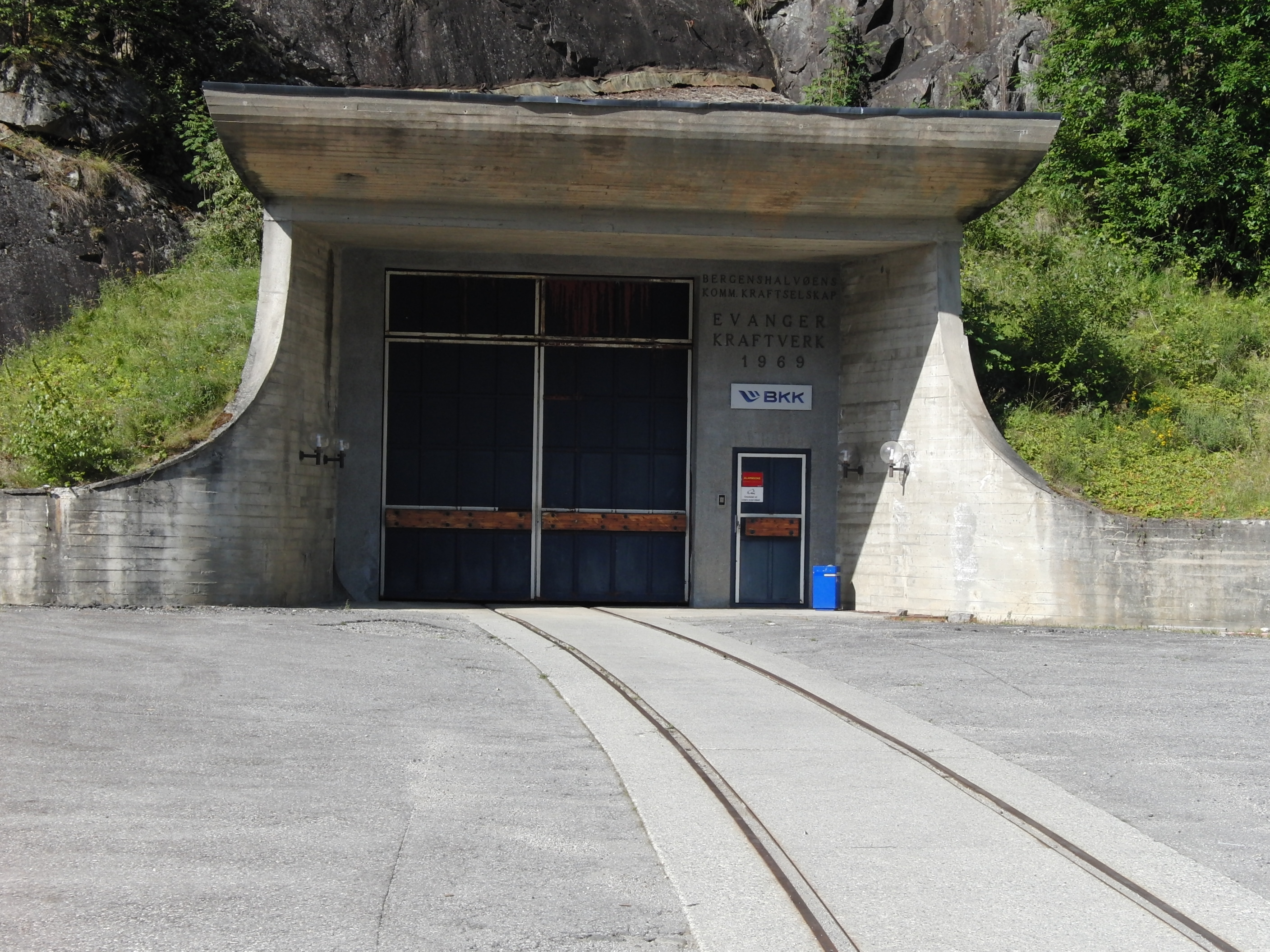 Evanger kraftverk